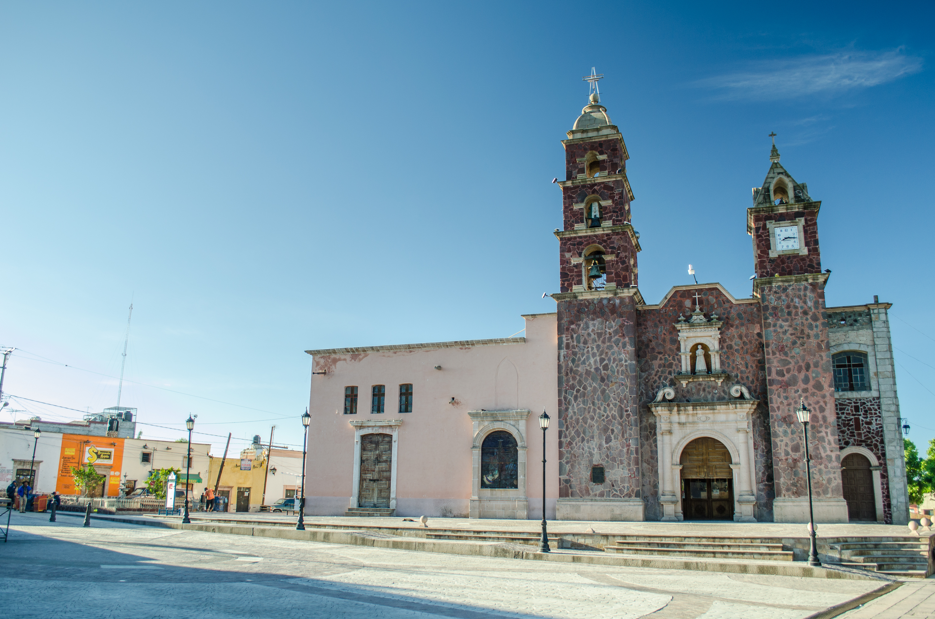 Parroquia San Diego De Alcala, San Diego de la Unión, Guanajuato, México.